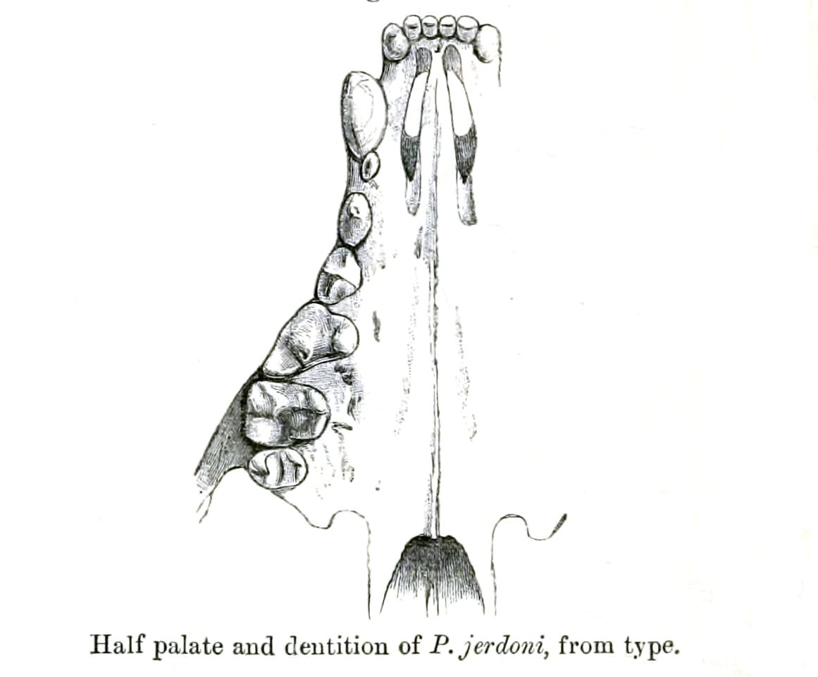 Paradoxurus jerdoni, painting by Joseph Smit